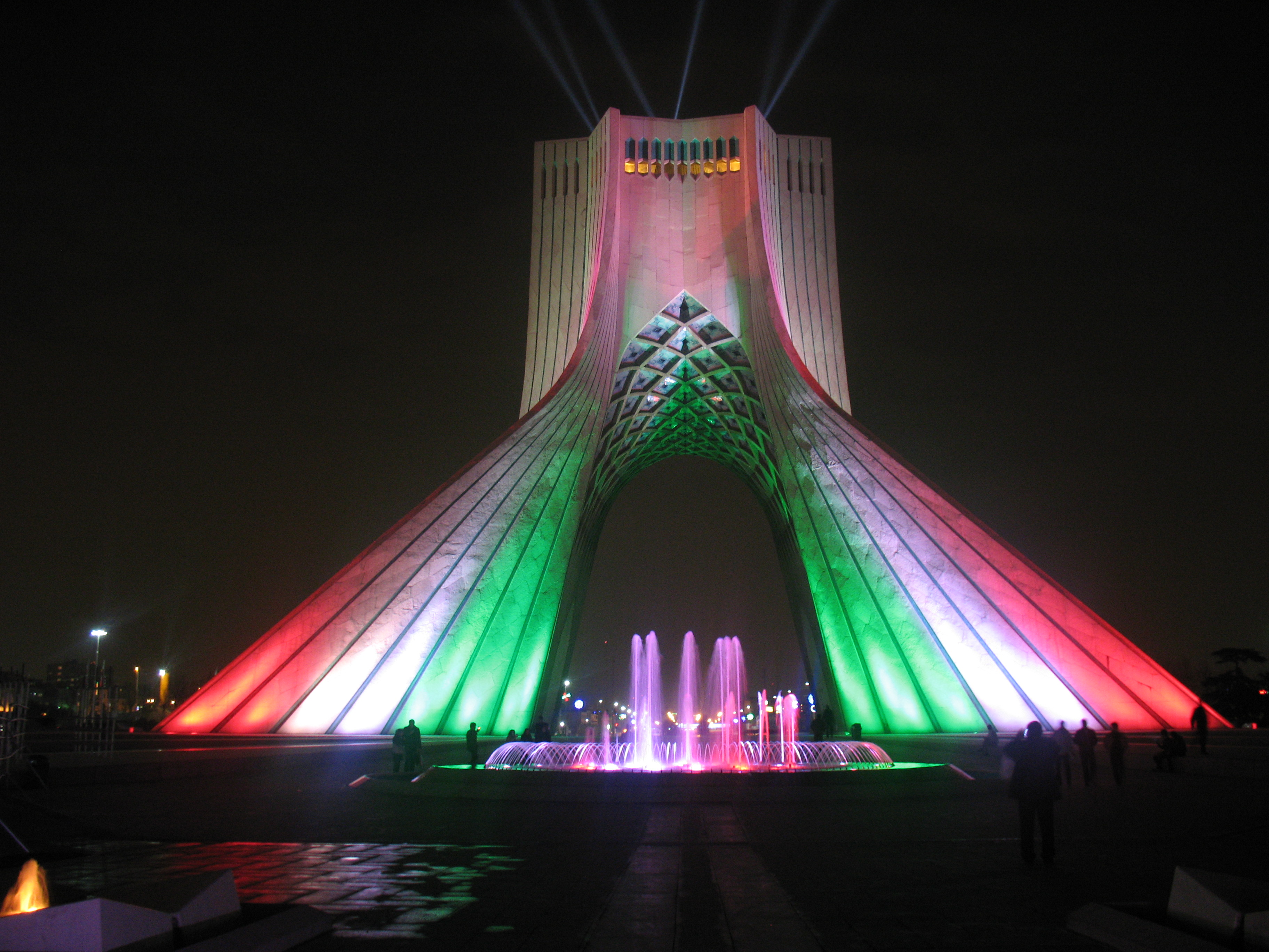 میدان آزادی، میدان شهیاد، برج آزادی، برج شهیاد، تهران Azadi Tower, Azadi Square, Meydea-e Azadi, Meydan-e Shahyad, Tehran province, Iran Flag colors